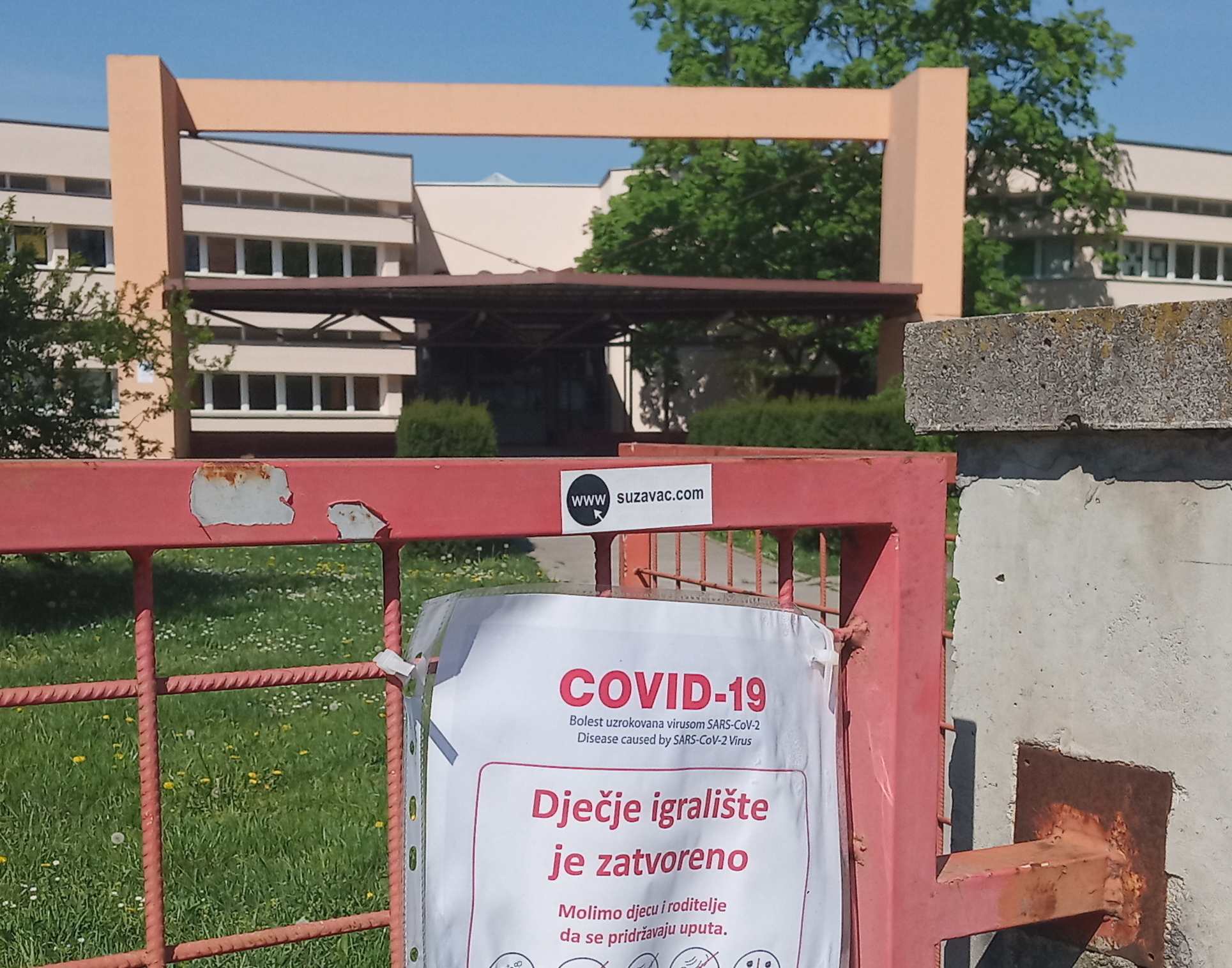 Upozorenje o koronavirusu na ogradi zaprešićke škole.